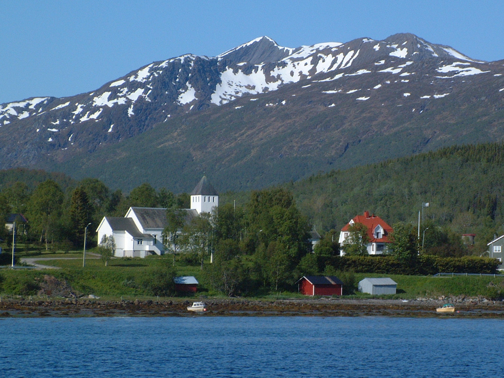 Kjeldebotn kirke, med Vargfjordtinden i bakgrunnen.